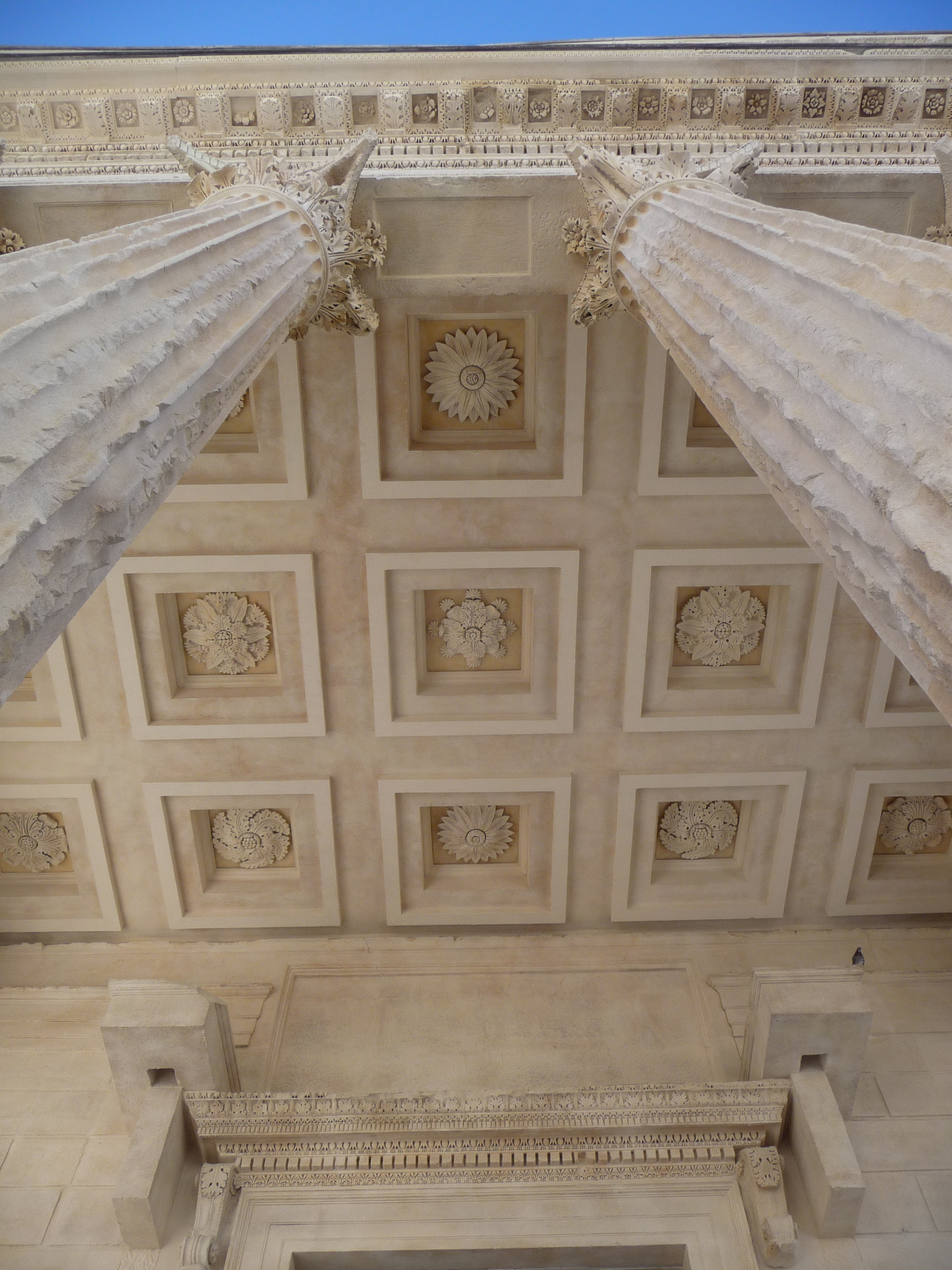 Contre plongée - entrée .